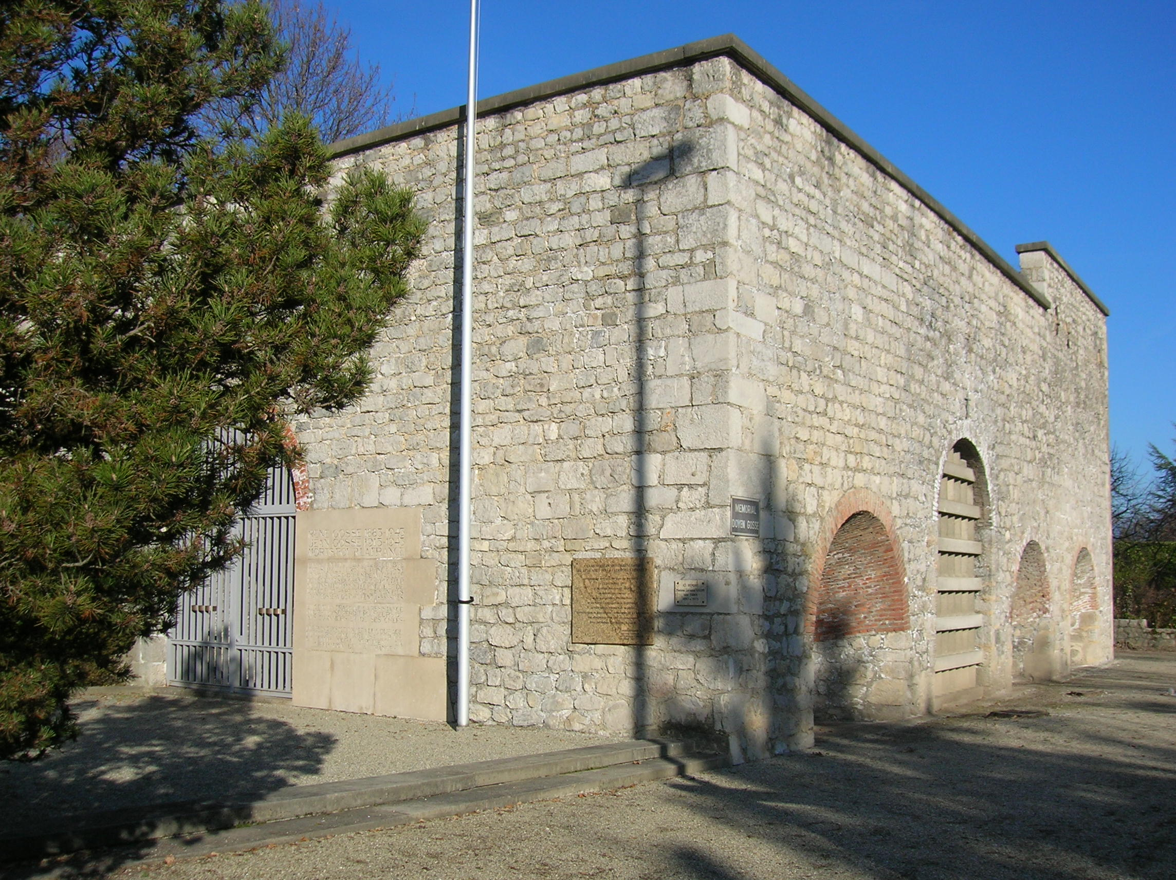 Mémorial Doyen Gosse ( Patrimoine du XXe siècle in Isère). Saint-Ismier, Isère, Rhone-Alpes, France.